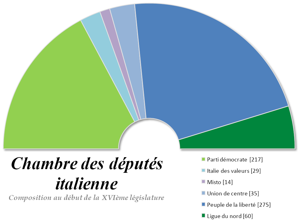 Composition de la Chambre des députés italienne à l'ouverture de la XVIème législature. Répartition par groupes politiques.